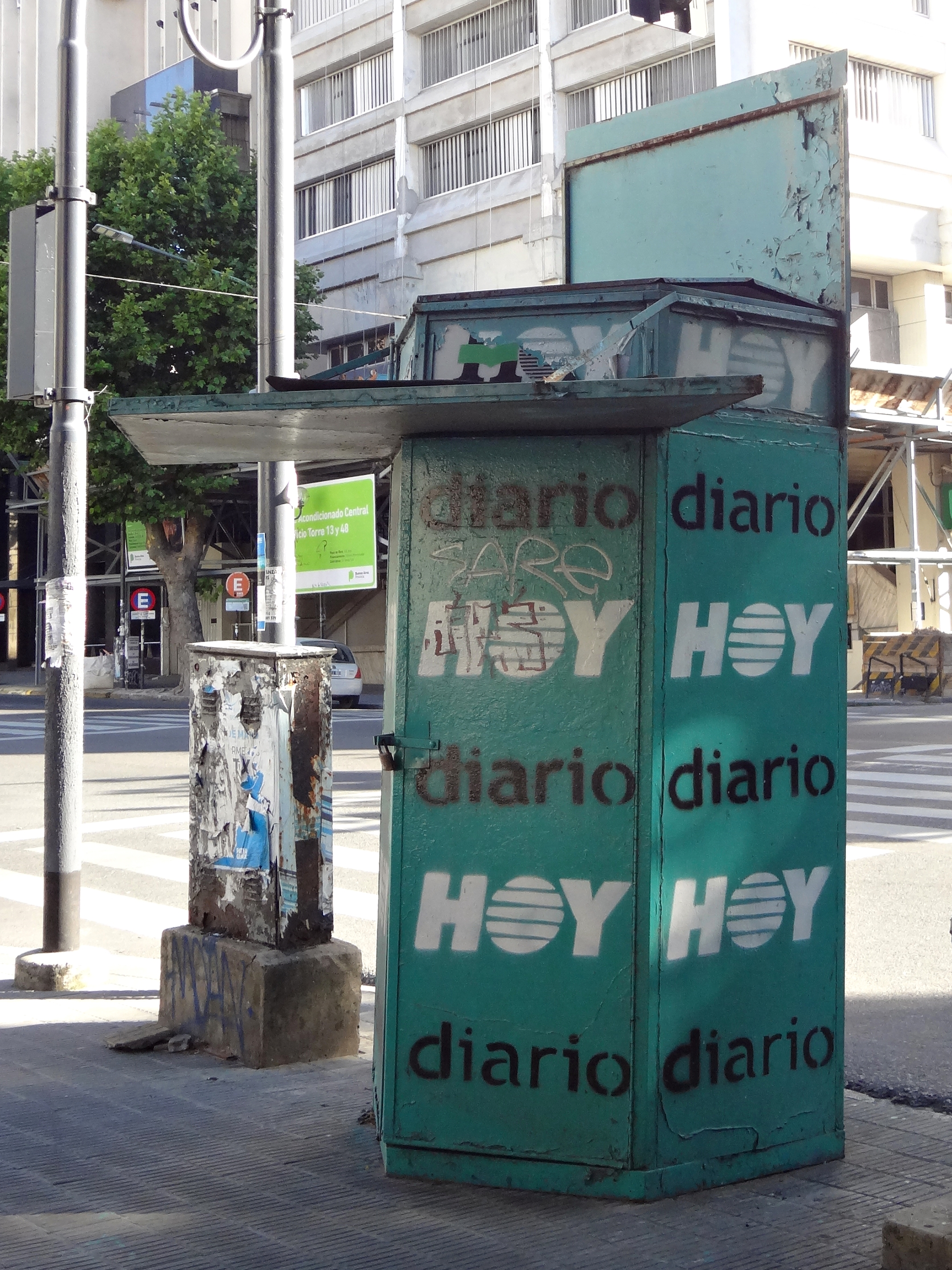 Puesto de diarios en la Ciudad de La Plata, con la publicidad de "Diario Hoy" - Diciembre 2018.